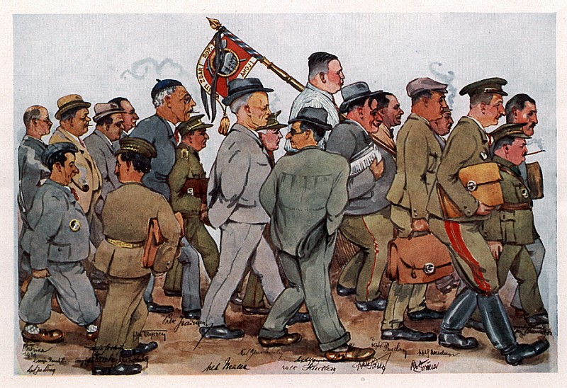 Ředitelství opevňovacích prací - akvarel kpt. Ed.Březiny z r. 1938 (jako poslední zcela vlevo)